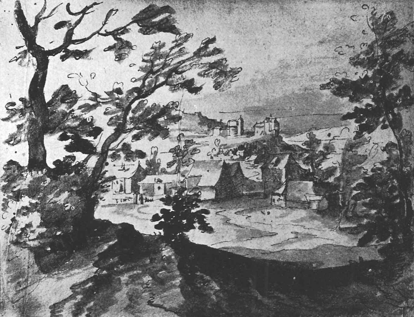 Landschaft mit Dorf und Burg (Federzeichnnung laviert); K79v